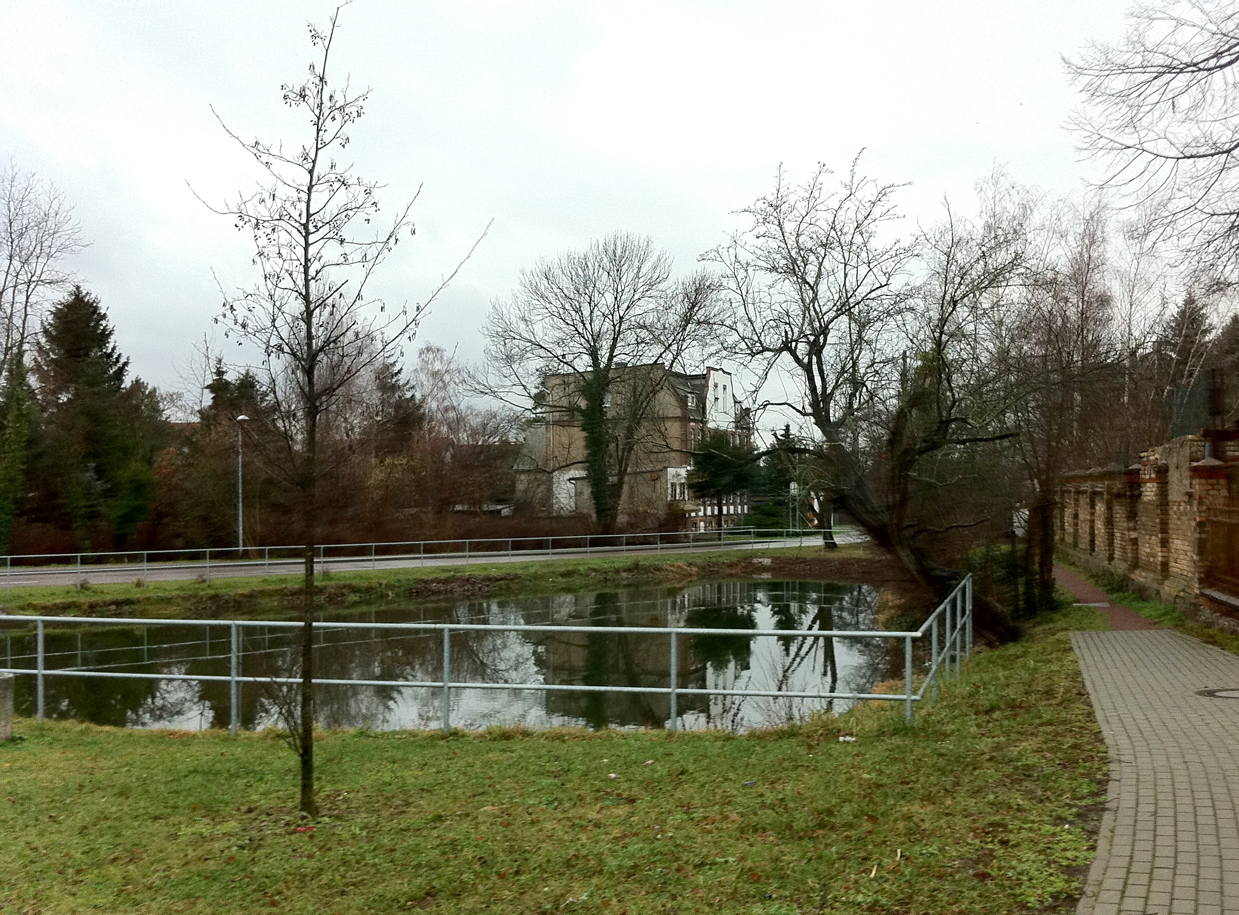 Teich in Schwoitsch